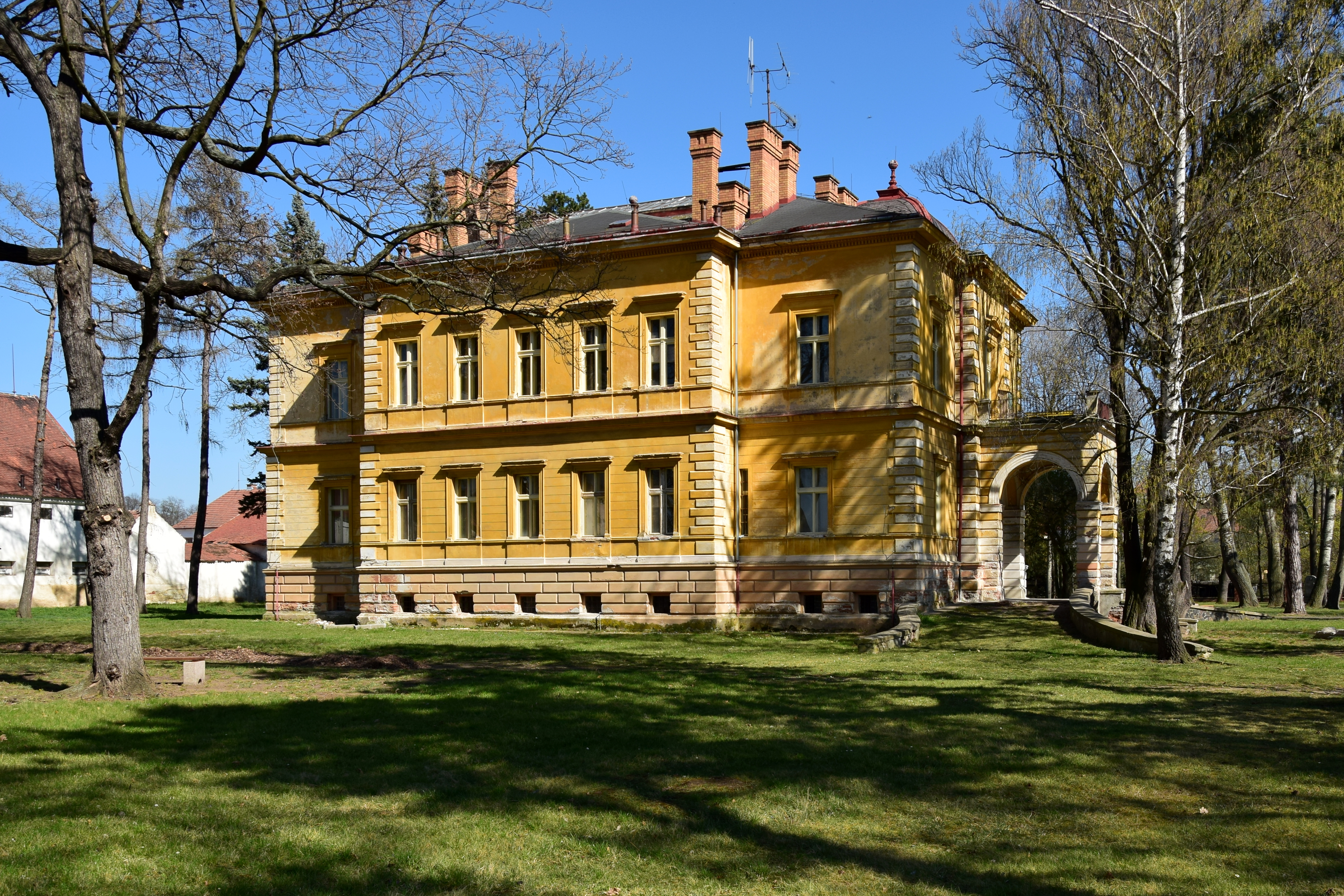 Zámek Nové Sedlo – západní průčelí